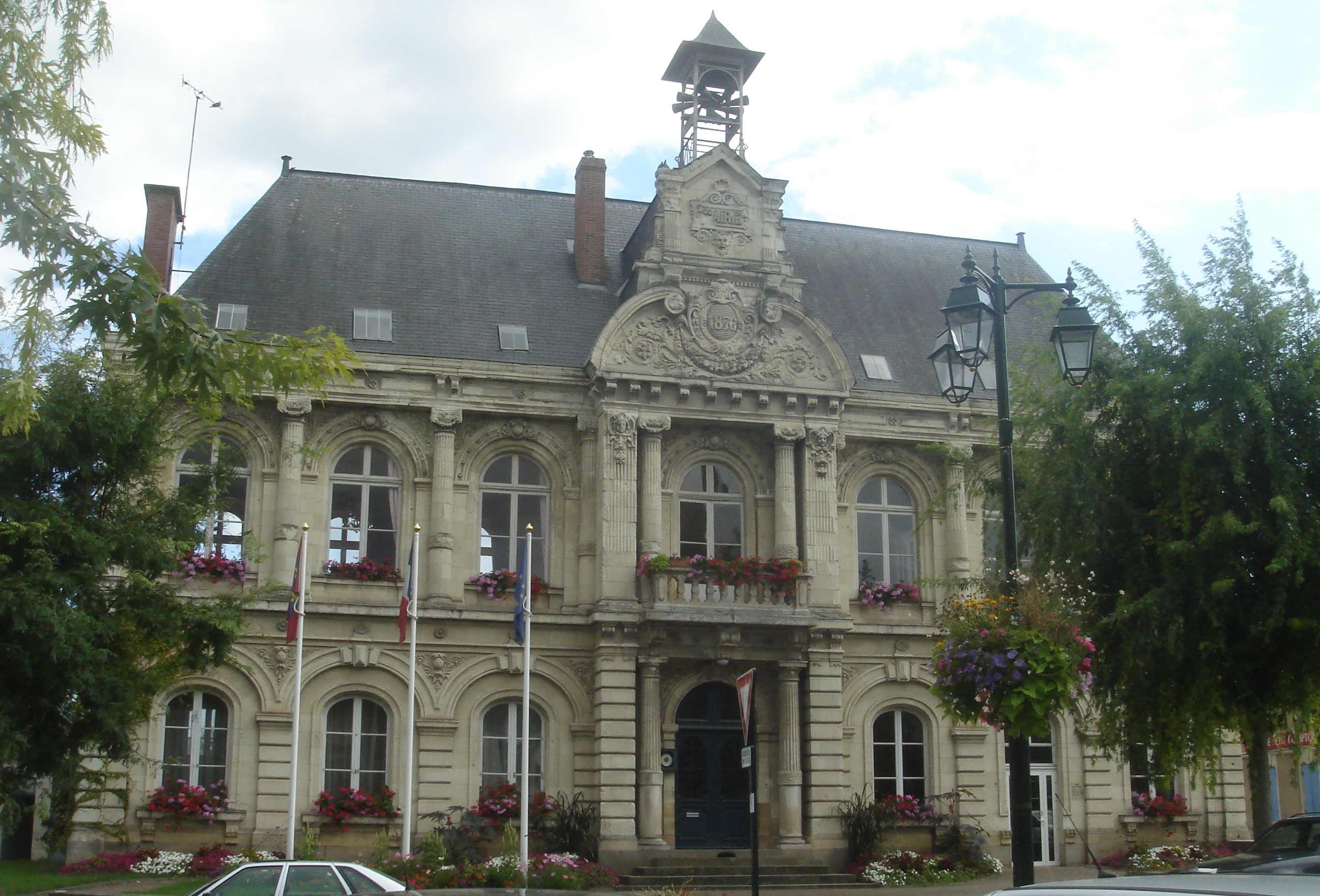 Mairie de Tiercé, Maine-et-Loire, France